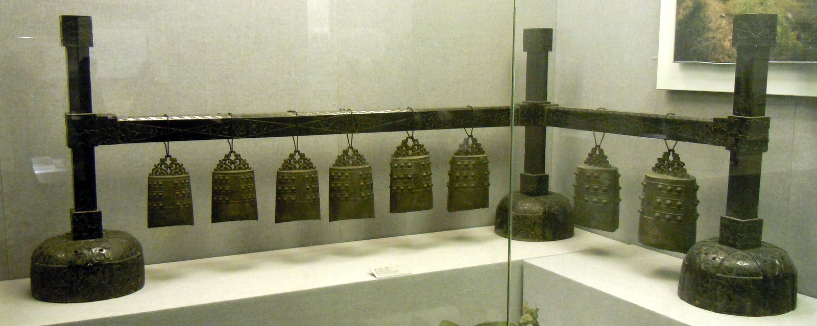 出土于河南省固始县侯古堆一号墓的“番子成周”镈钟